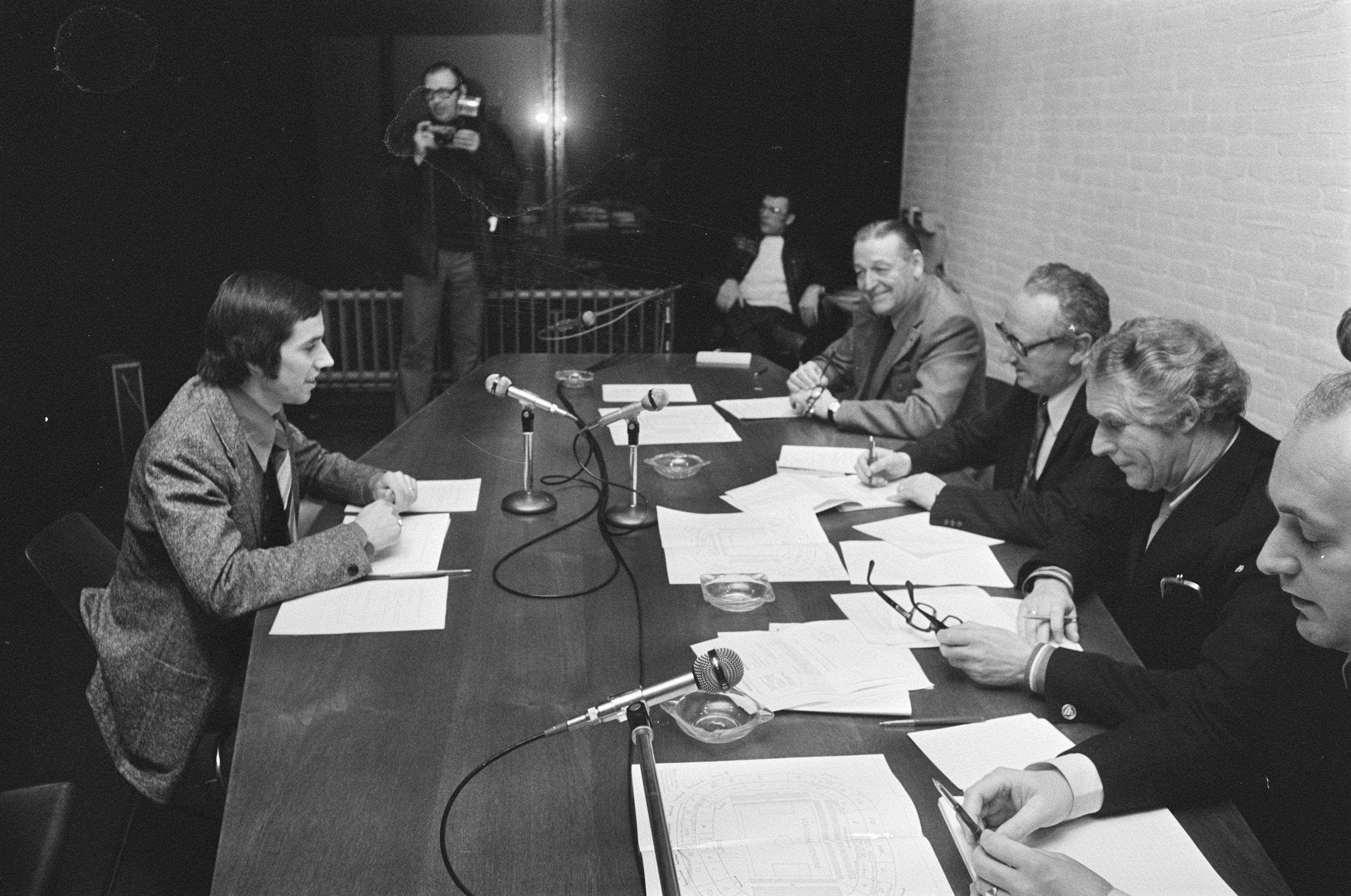 Collectie / Archief : Fotocollectie Anefo Reportage / Serie : [ onbekend ] Beschrijving : Behandeling tuchtcommissie van de KNVB in de zaak Quaars tegen Griek (grensrechter); Quaars voor de tuchtcommissie Datum : 29 december 1975 Trefwoorden : rechtspraak, voetbal Persoonsnaam : Quaars, Bertus Instellingsnaam : KNVB Fotograaf : Verhoeff, Bert / Anefo Auteursrechthebbende : Nationaal Archief Materiaalsoort : Negatief (zwart/wit) Nummer archiefinventaris : bekijk toegang 2.24.01.05 Bestanddeelnummer : 928-3390